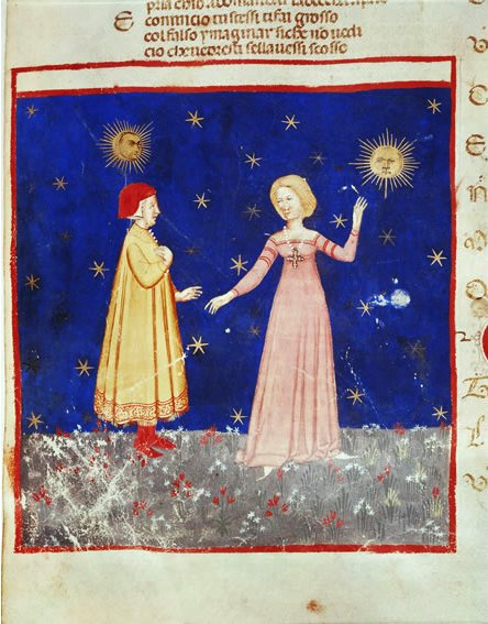 Dante, Divine Comédie: Rencontre de Dante et de BéatriceXIVe siècle. École vénitienne. Enluminure. Libreria Marciana, Venise.Dante suit Béatrice pour contempler les étoiles immobiles, merveilles de la création, dans la profondeur de l’amour divin.